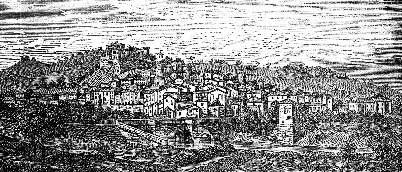 Panorama de Castrocaro à fin du 19 ième siècle